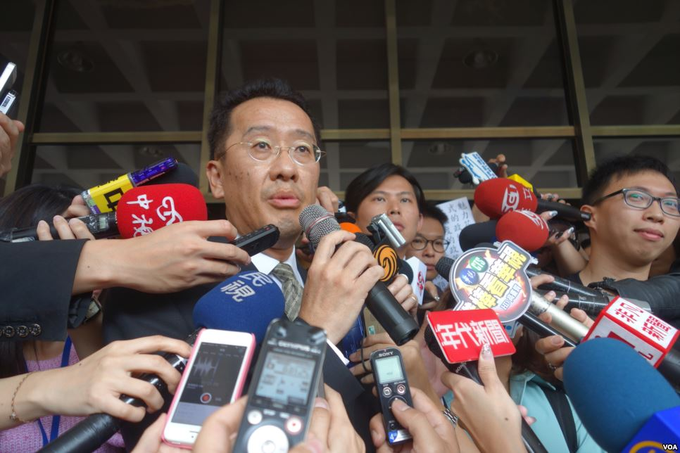 顧立雄、黃國昌、林飛帆與魏揚在臺灣臺北地方法院大門舉辦記者會，接受中視新聞、民視新聞、鳳凰衛視、年代新聞、華視新聞、三立新聞、非凡新聞等聯訪。